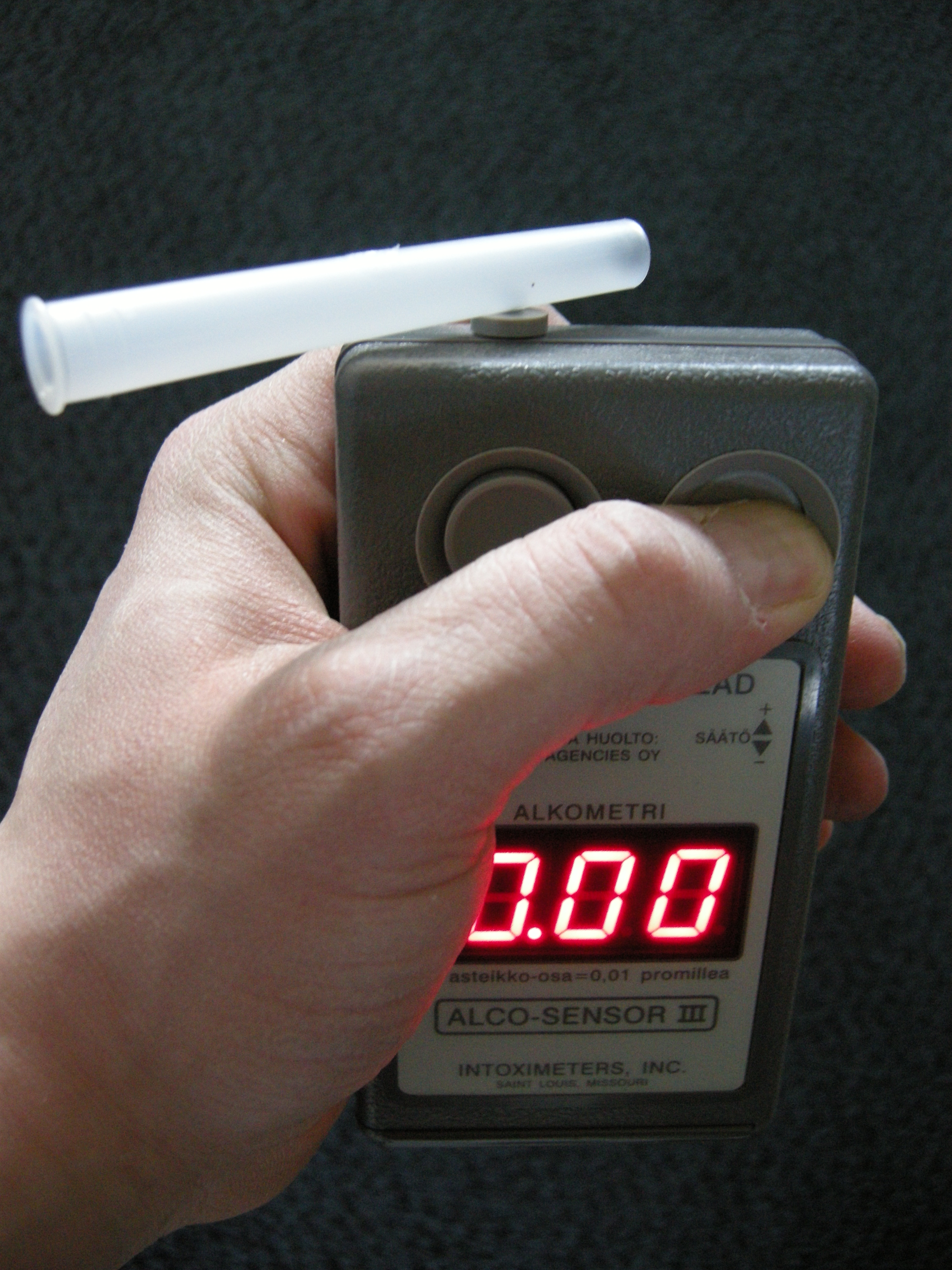 Alkometri, viranomaiskäytössä oleva Suomalainen malli Alco-Sensor III